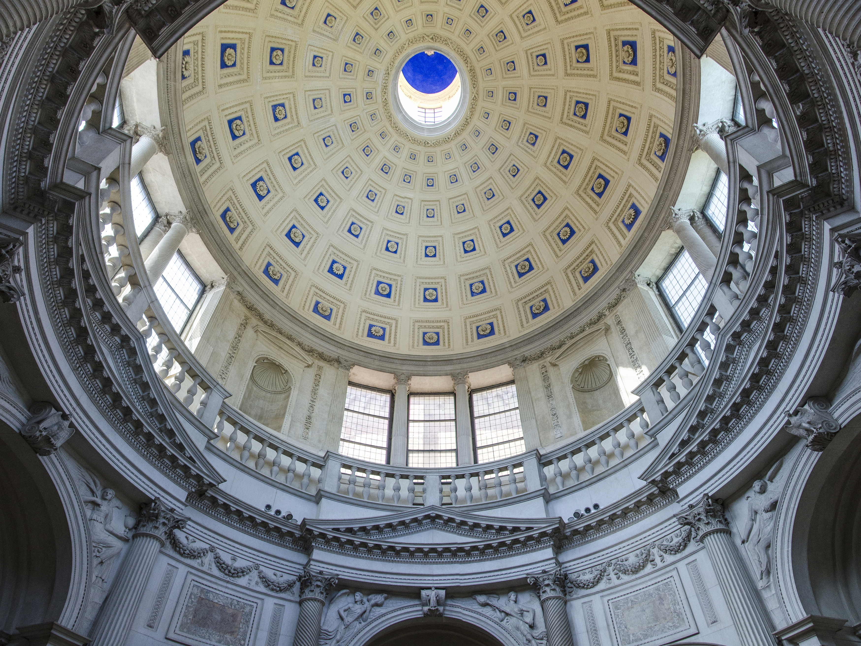 Chiesa di San Bernardino a Verona